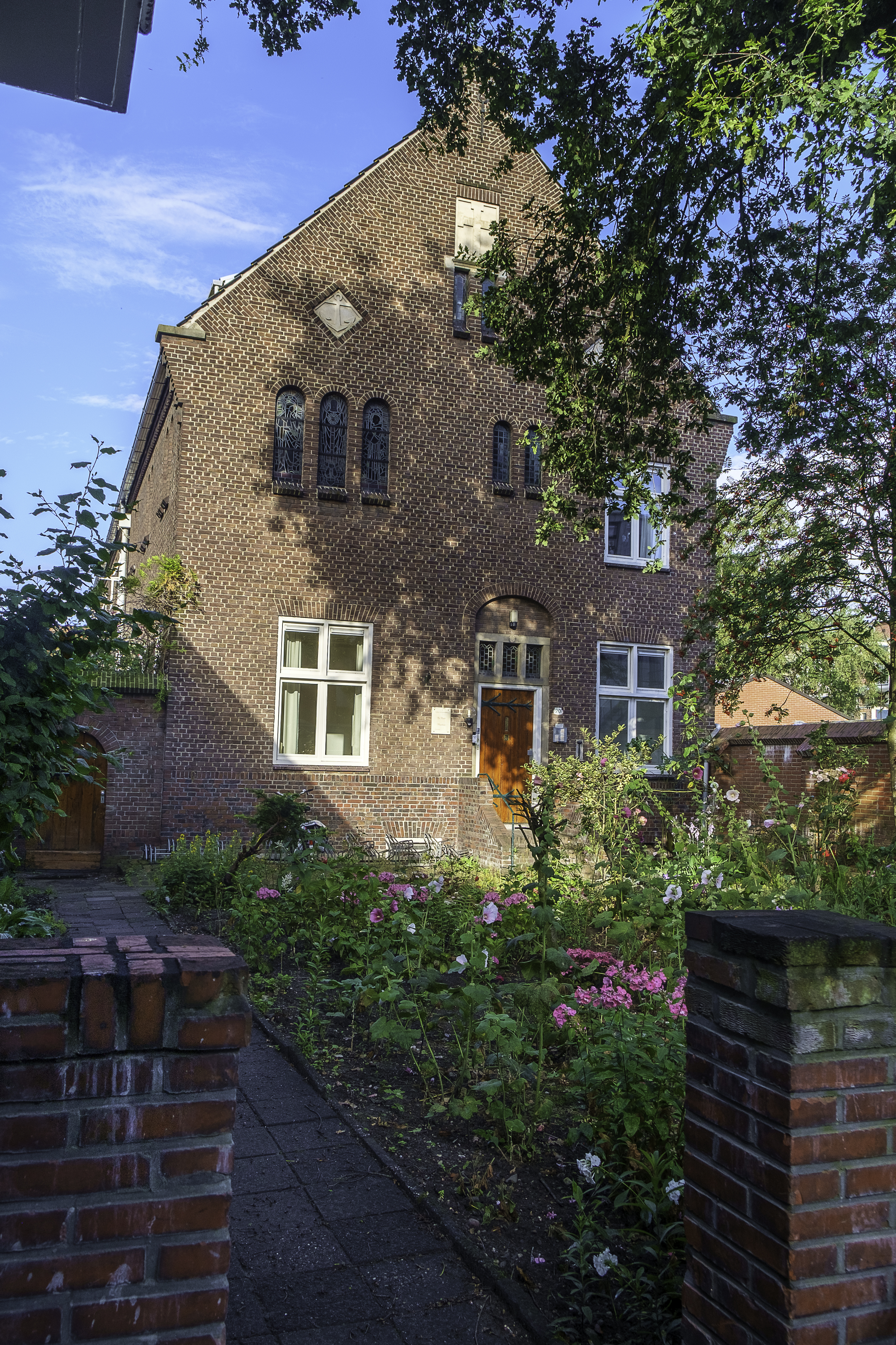 Klooster Moesstraat of Huize Lidwina.